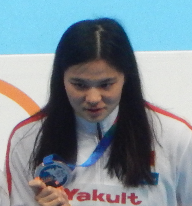 Медалисты чемпионата мира в Казани на дистанции 200 метров брассом у женщин